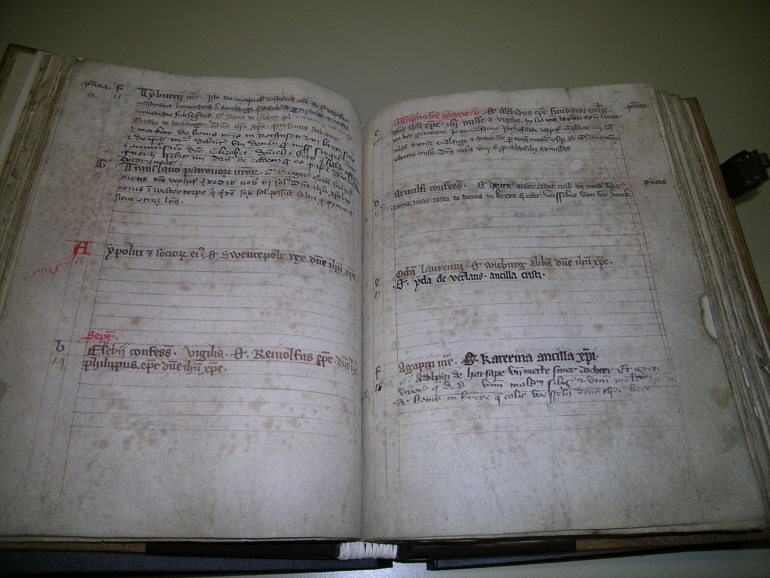 Seite aus dem Essener Necrolog, der Mitte des 14. Jahrhunderts angelegt wurde. Aufgeschlagen ist der 15. August (rechte Seite oben) mit dem Eintrag für Altfrid, aufgenommen auf der Tagung "wie das Gold den Augen leuchtet - Der Essener Domschatz" des Arbeitskreises zur Erforschung der Frauenstifte